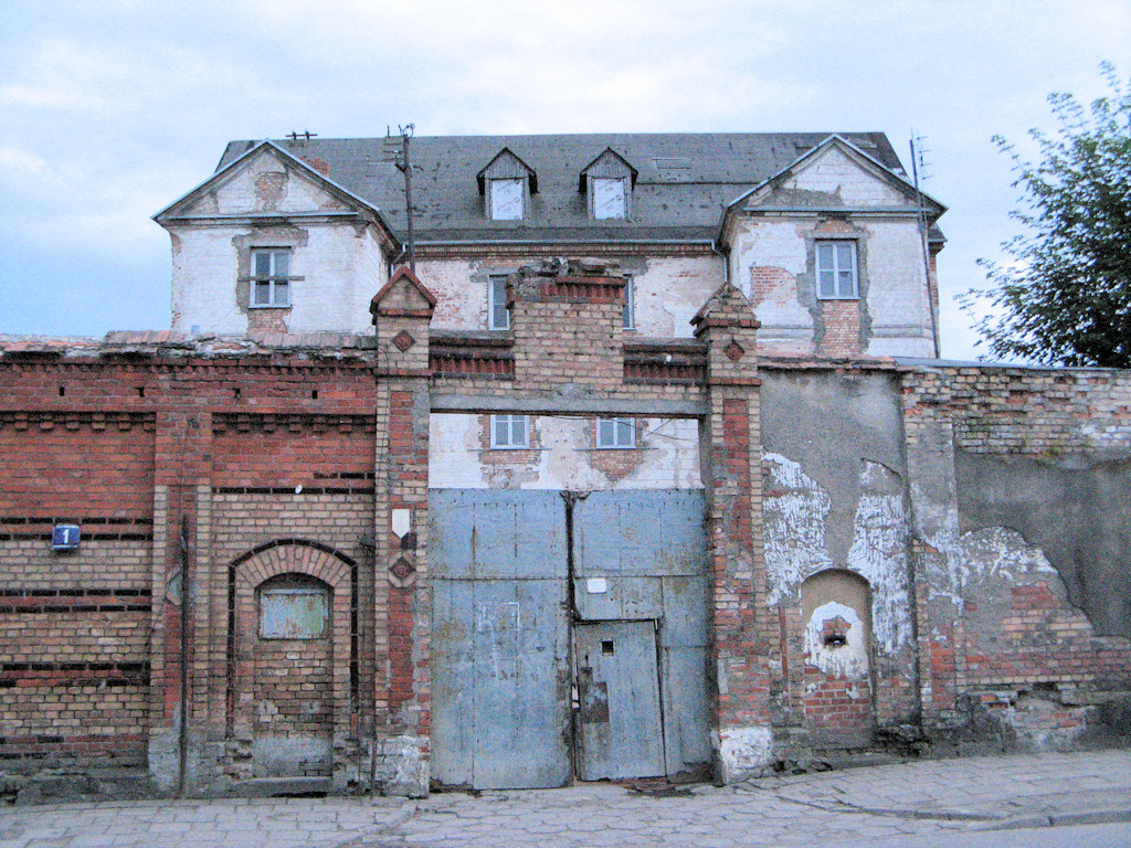 Ruiny zamku w Ełku